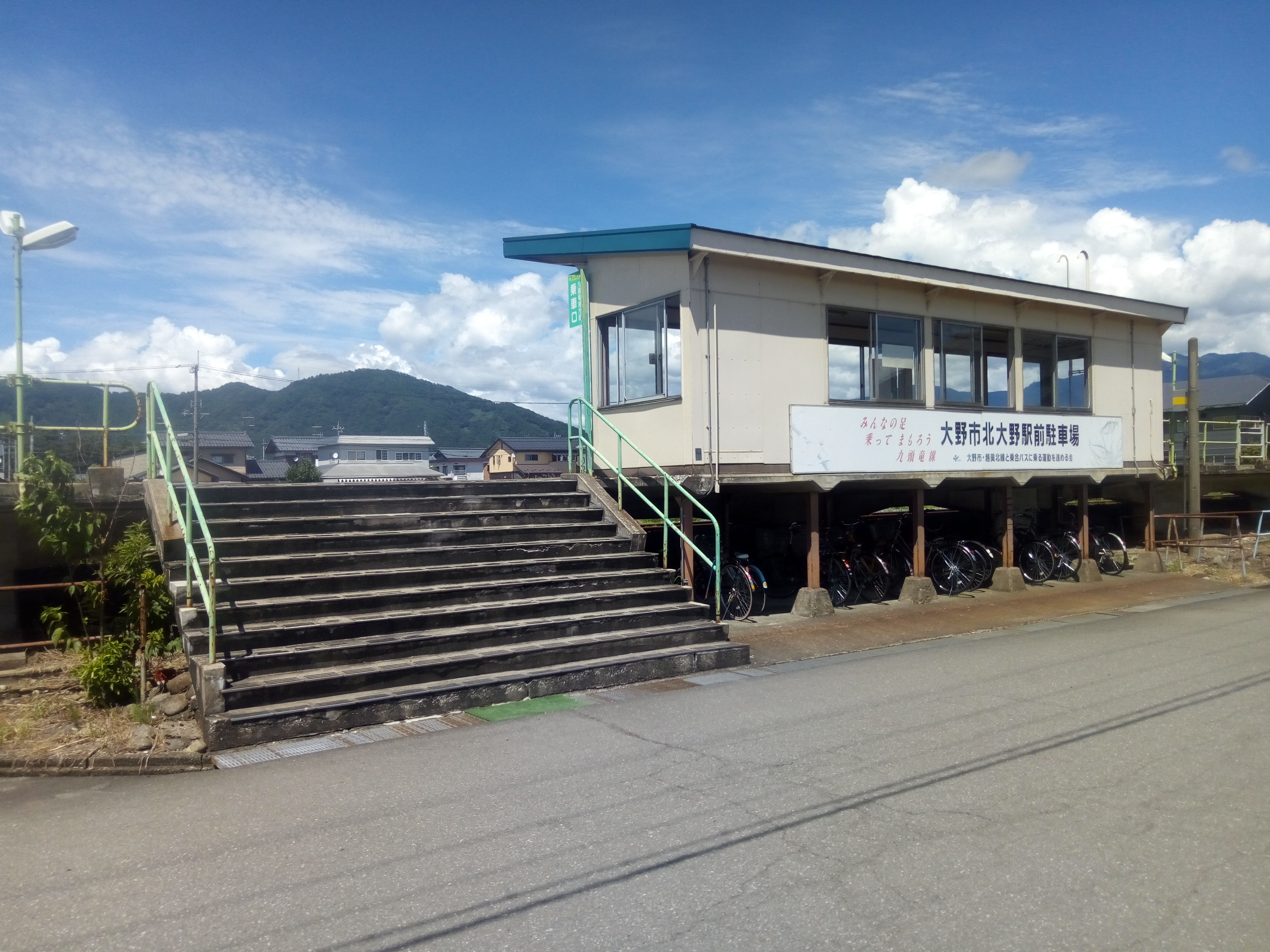 北大野駅入り口および待合室